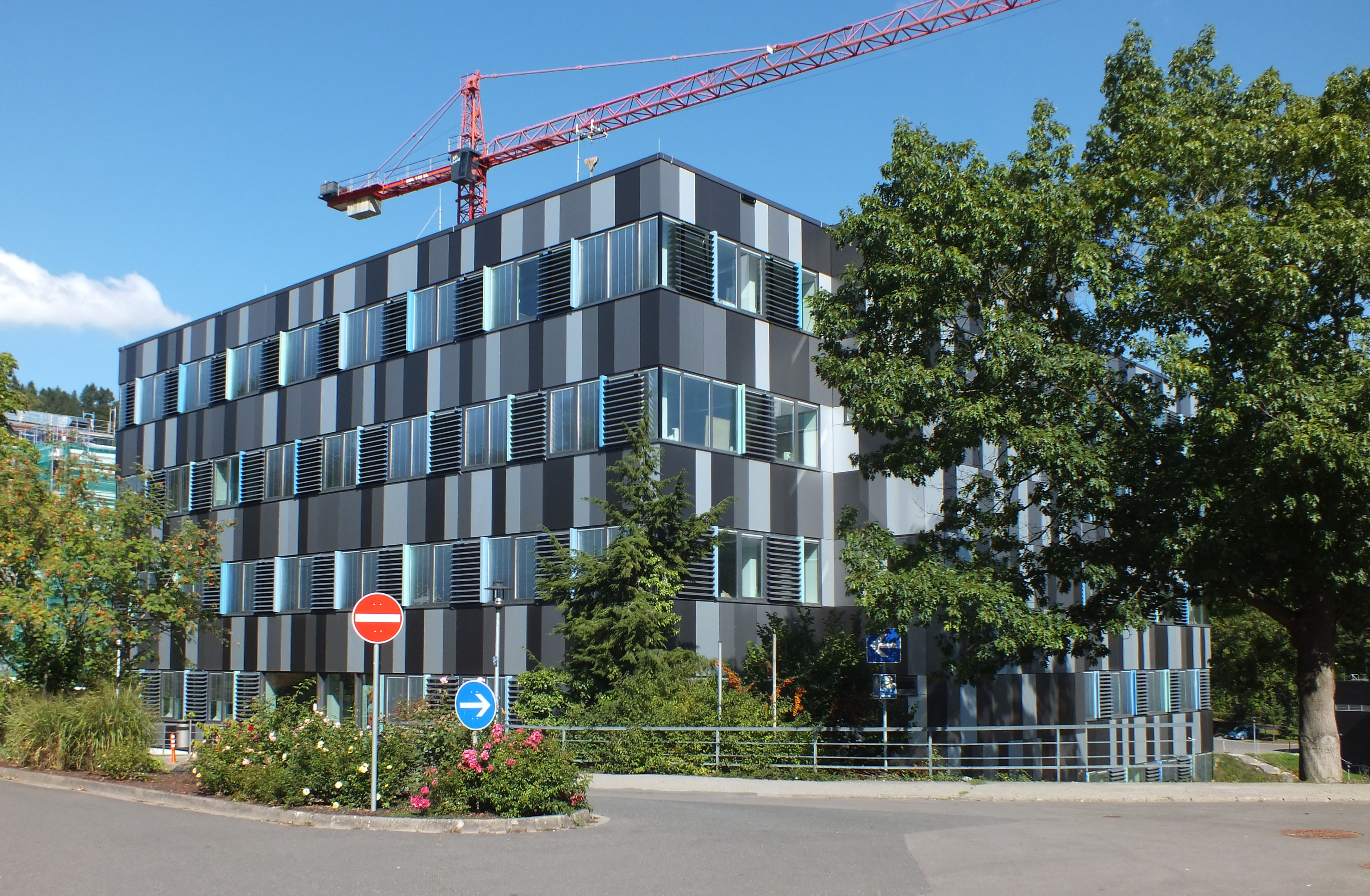 Hochschule Trier, Hauptcampus (Standort Schneidershof) - neurenoviertes Gebäude D